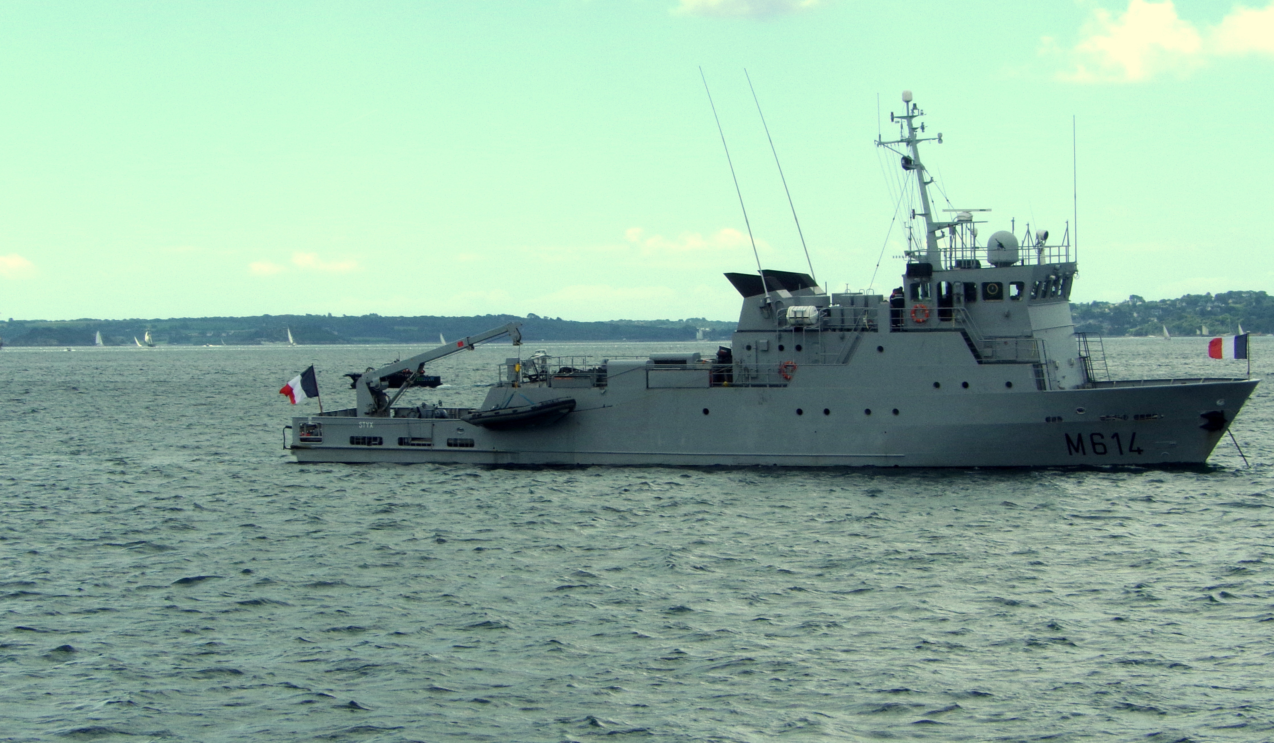 Le bâtiment-base de plongeurs démineurs Styx (M614) en rade-abri